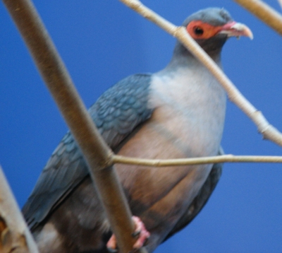 Papuan Mountain Pigeon - Gymnophaps albertisii